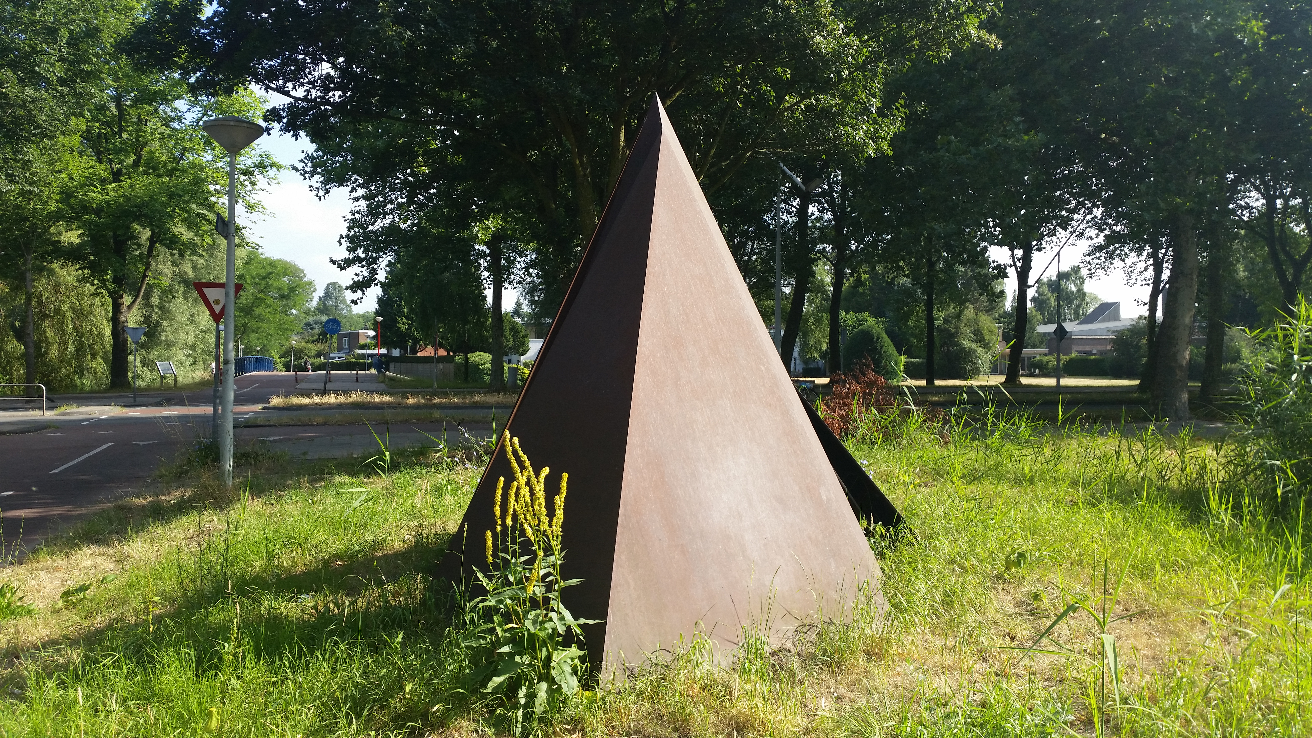 Shelter van Tony Andreas in Amsterdam